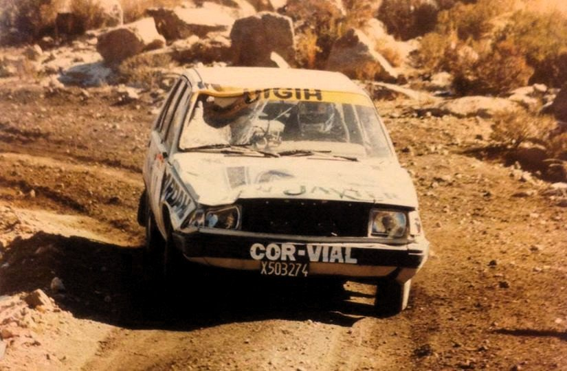 Juan Maria Traverso en el Rally Argentina 1987, sobre un Renault 18 GTX, luego de haber tenido un vuelco.